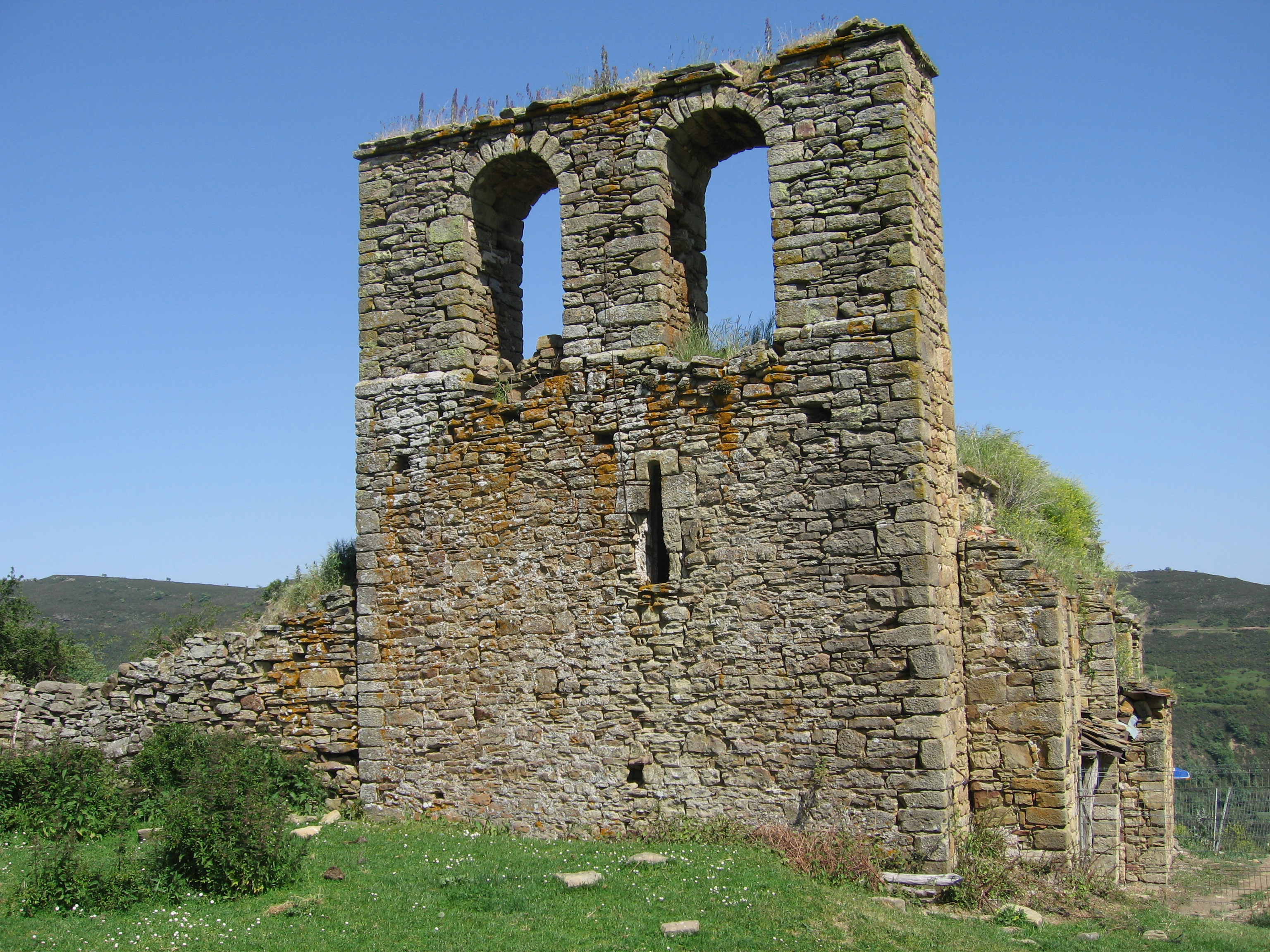 Ermita de Bucesta, aldea de Santa Engracia del Jubera (La Rioja, España).